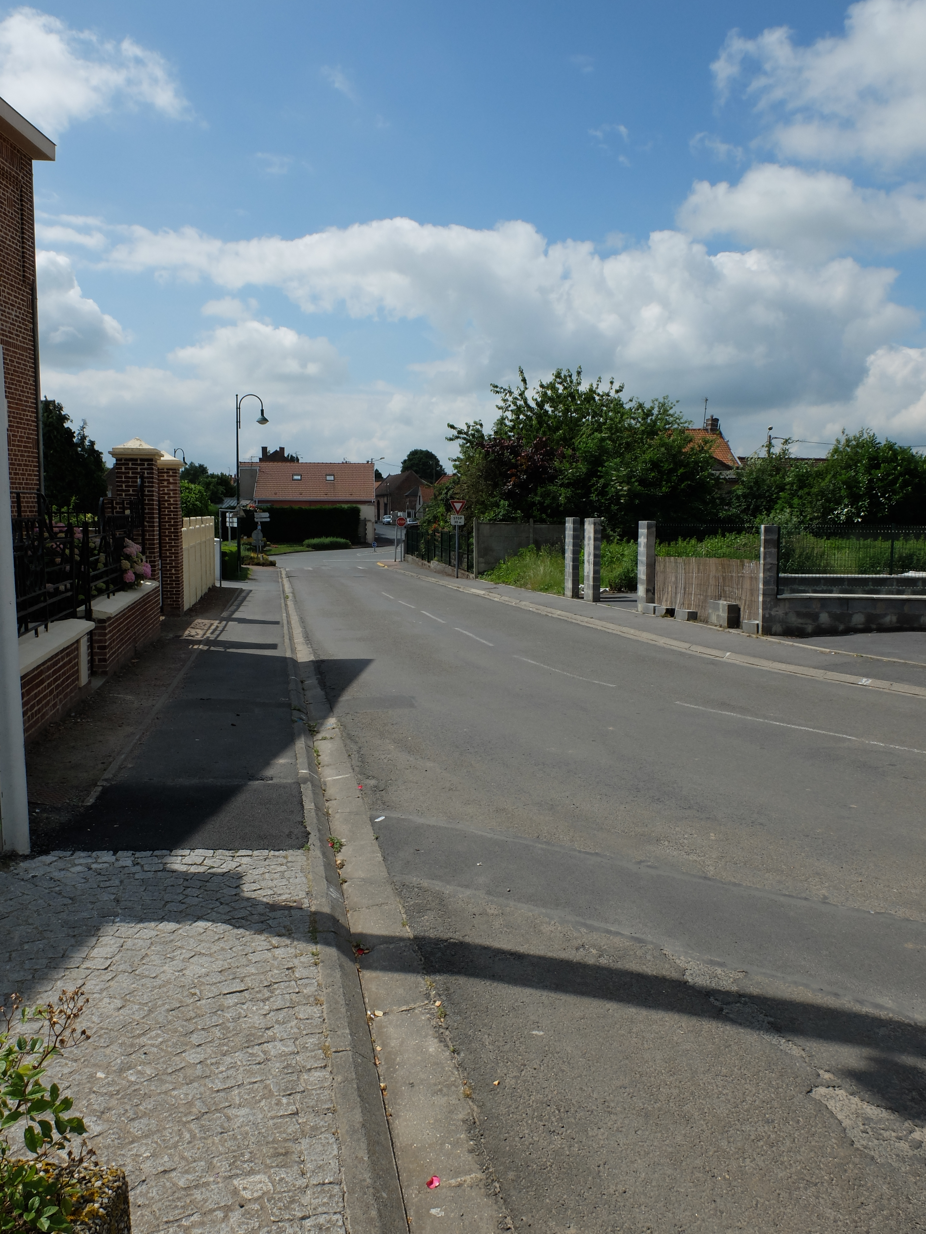 Vue de la rue de la mairie d'Estrées, dans le Nord.